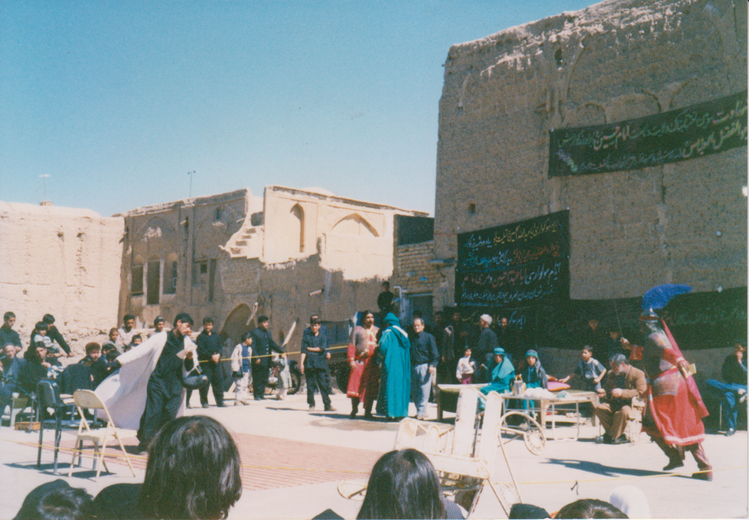 مراسم تعزیه، در شهر سمنان، در دهه 1380 هجری شمسی